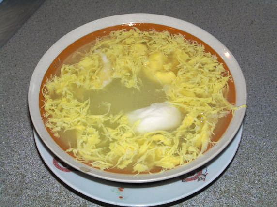 Egg tong sui